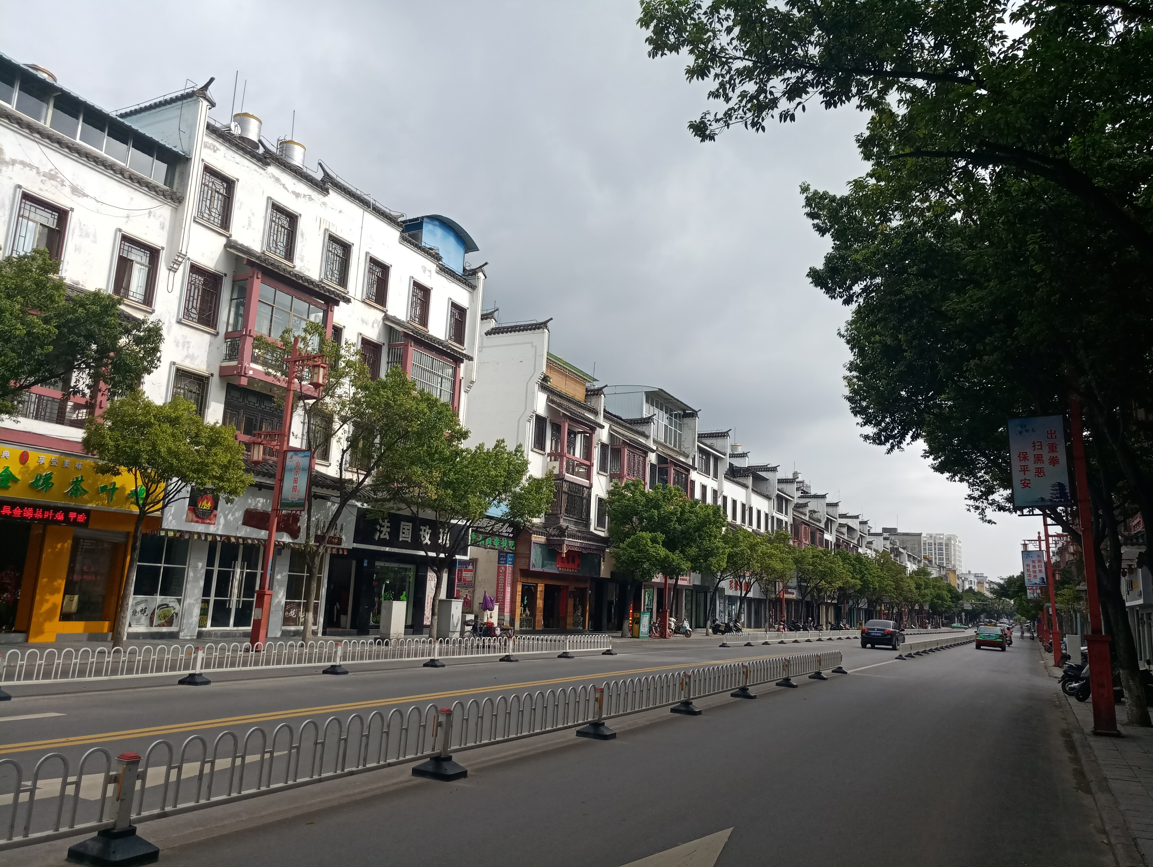 中文（中国大陆）: 保山市-正阳南路